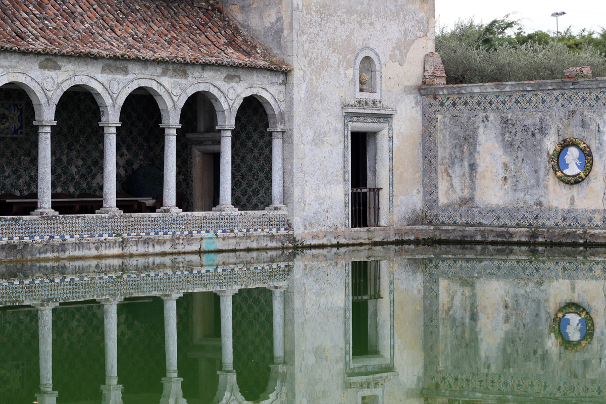 Quinta da Bacalhôa